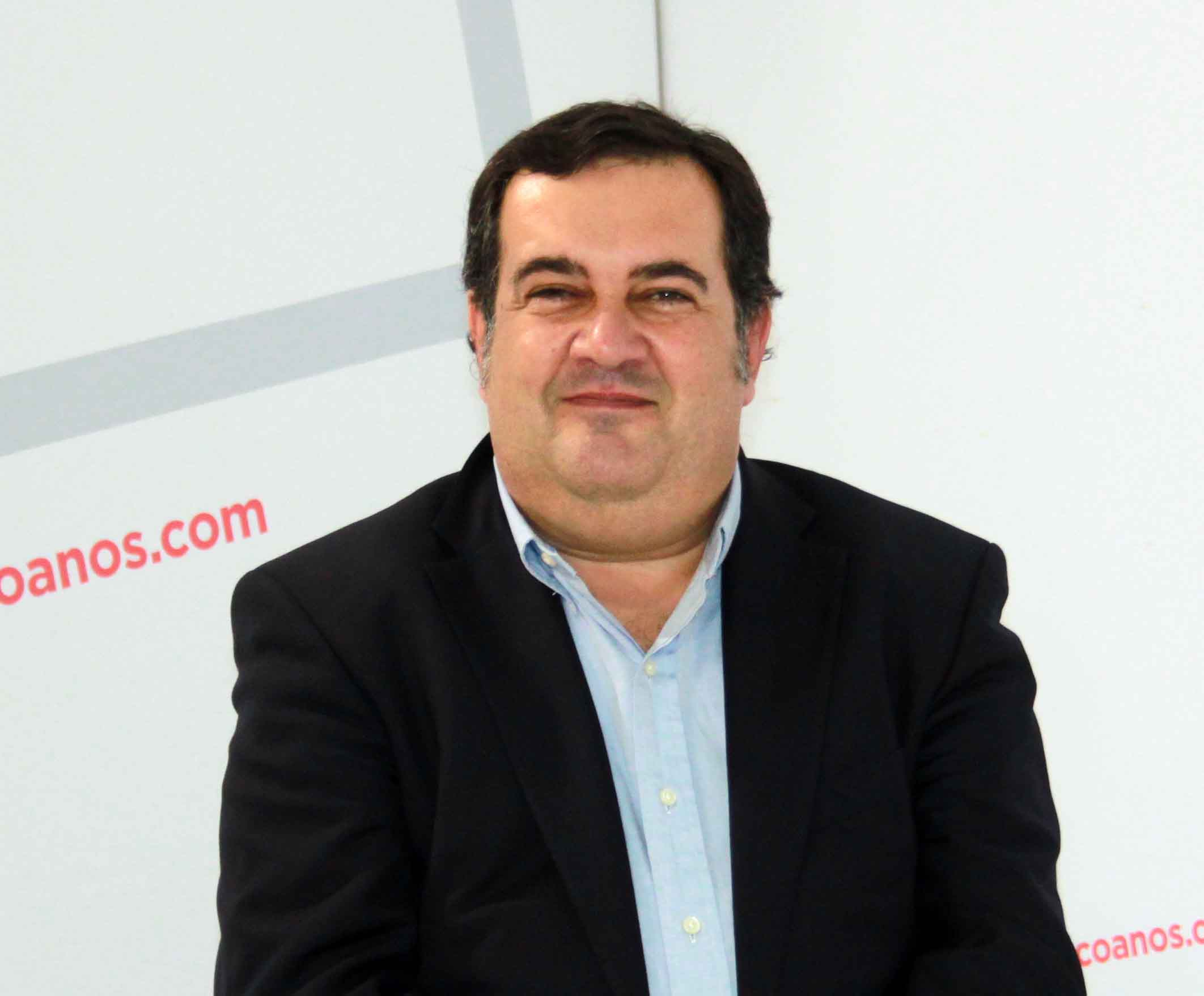 retrato de Ernesto Gasco